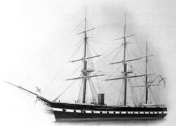 Фрегат "Олег" в первые годы службы